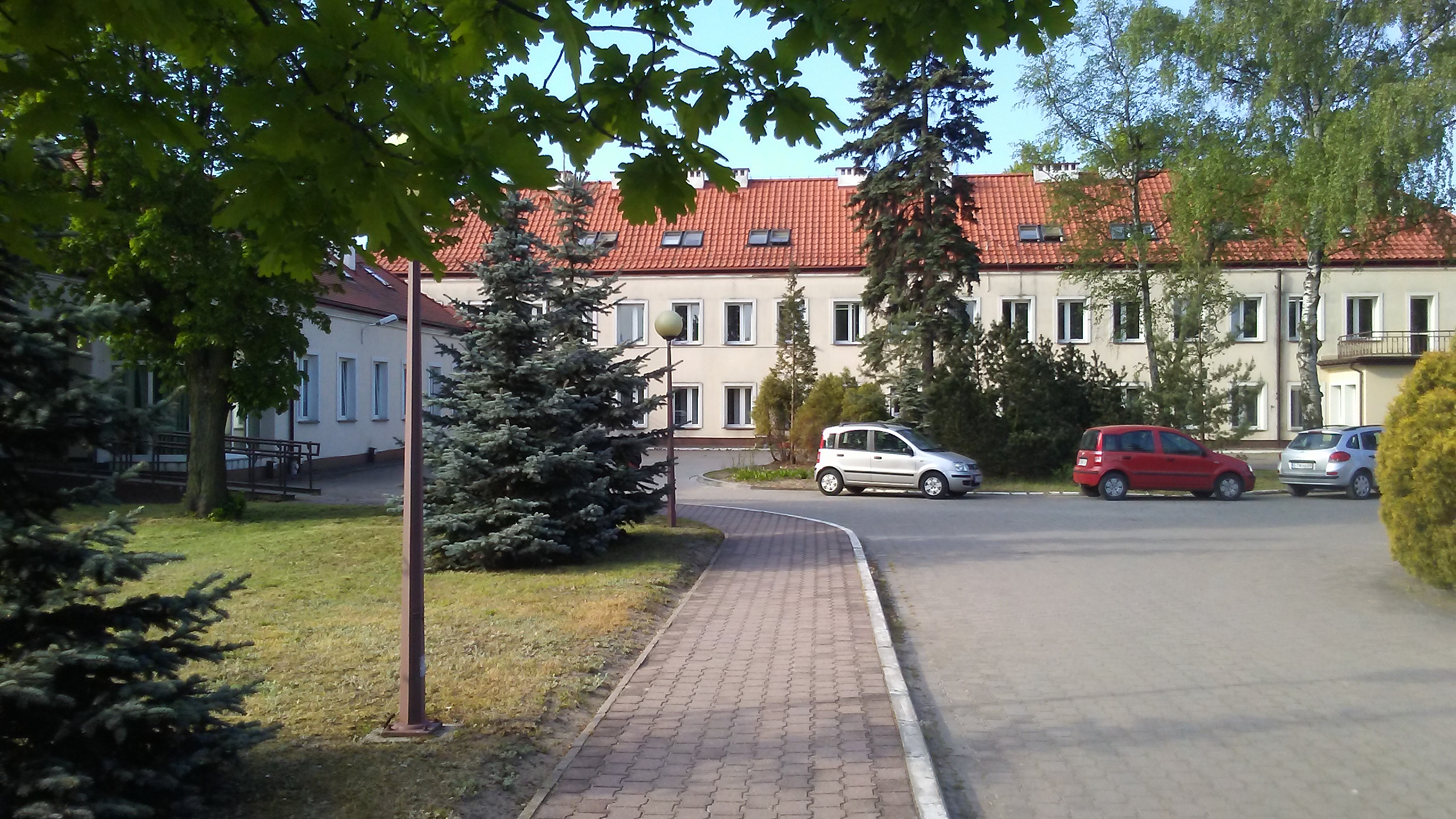 KRUS w Tomaszowie Mazowieckim, ul. Stefana „Grota” Roweckiego 38